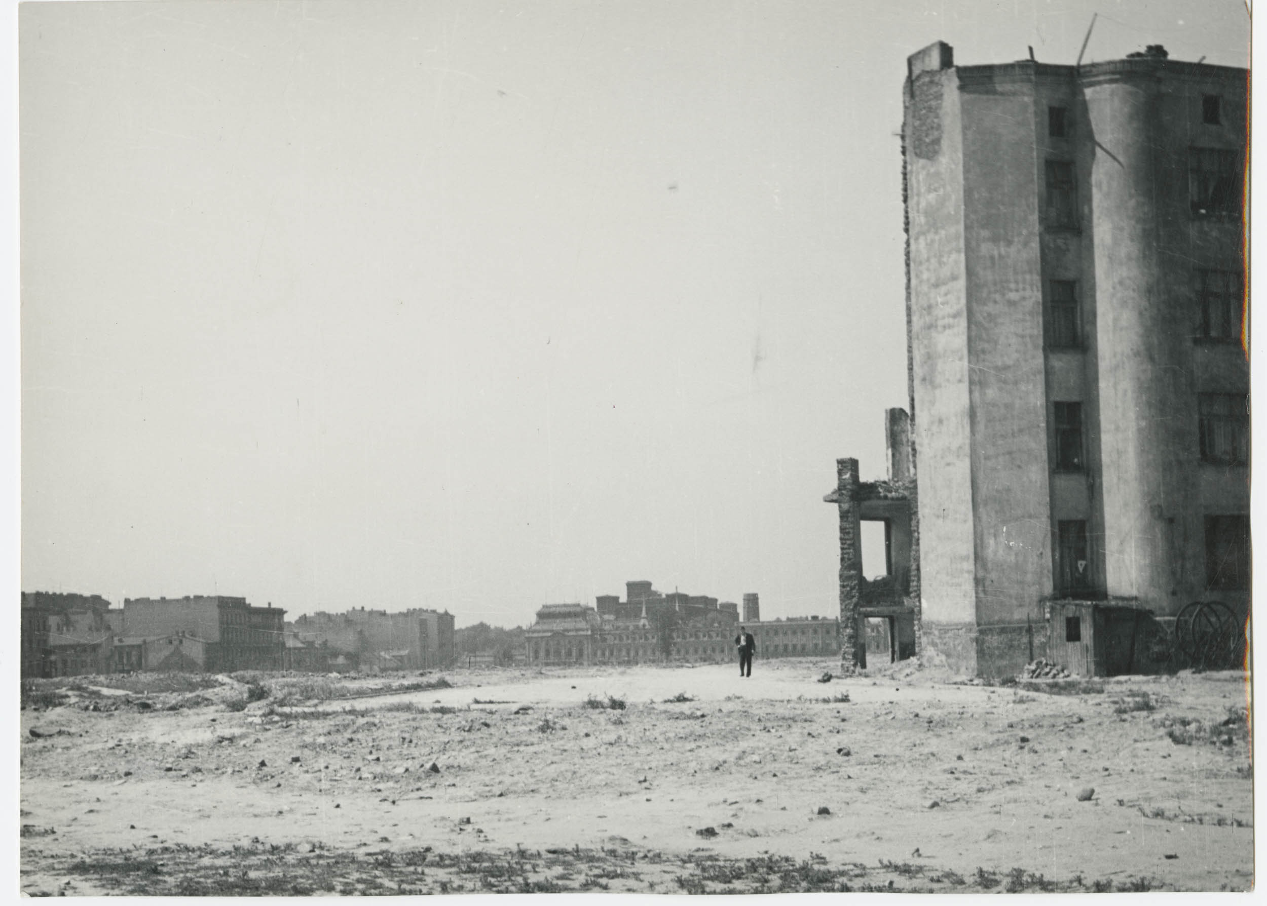 Fotografia Ignacego Płażewskiego wykonana przed 1951 r. przedstawiająca od strony wschodniej teren dawnego Litzmannstadt Getto, na którym powstał park Staromiejski. W tle widoczne są pałac Izraela Kalmanowicza Poznańskiego oraz zabudowania fabryczne. Ten fragment miasta, który w trakcie II wojny światowej został najbardziej zniszczony, przed 1939 r. zamieszkiwany był przede wszystkim przez ludność żydowską. Dalsze wyburzenia odbyły się już po 1945 r., a na powstałym pustym placu postanowiono założyć park miejski. Park Staromiejski powstał w latach 1951-1953 wg projektu inż. K. Chrabelskiego, potocznie zwany jest Parkiem Śledzia. Ta nazwa związana jest z funkcjonowaniem w tym miejscu przed II wojną światową składu i targu rybnego.